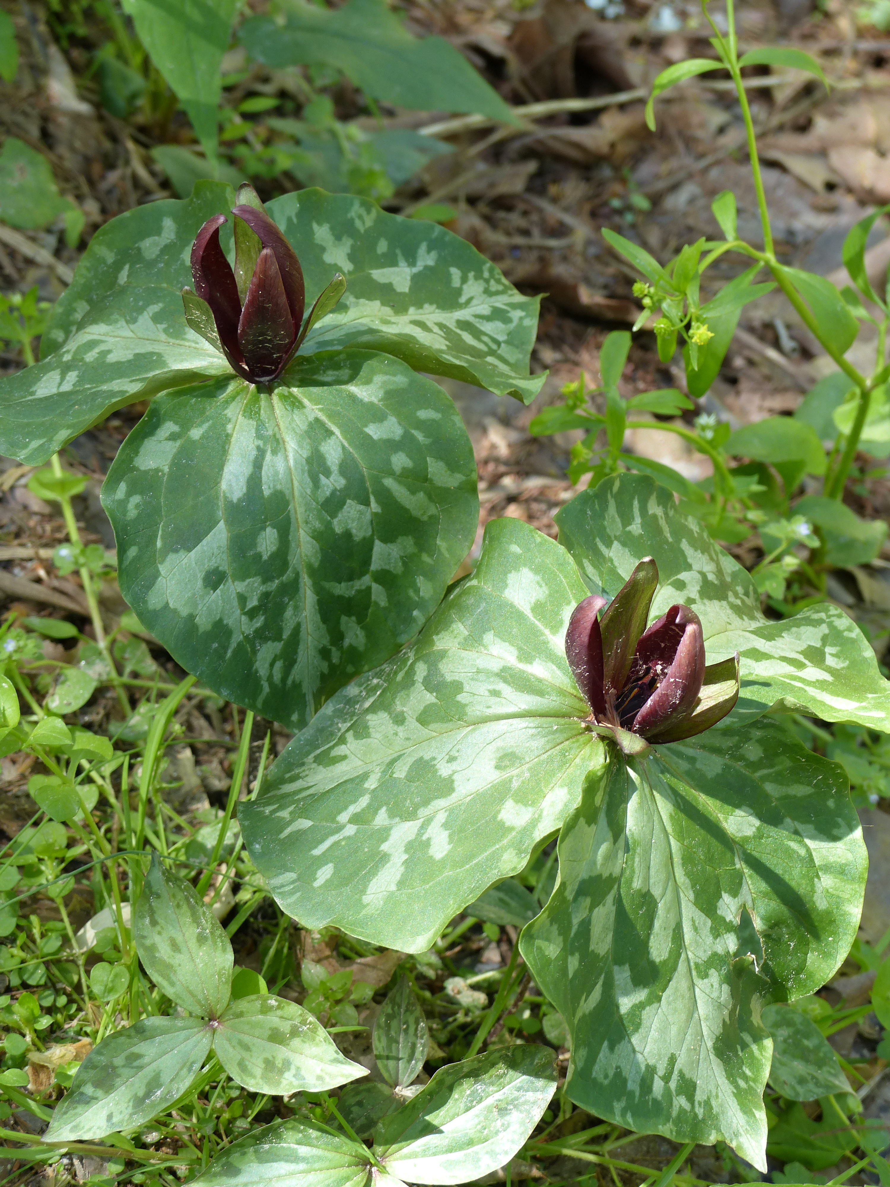 Purple Toadshade